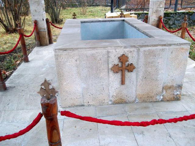 Nij, Azerbaijan; Christian people from village can be baptised here.